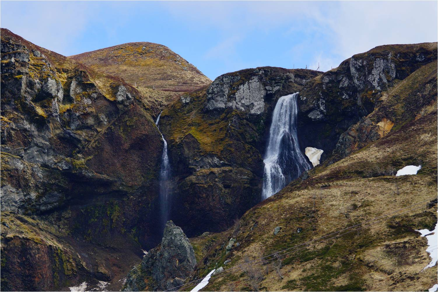 Cette cascade est la toute jeune Dore avant sa confluence avec la Dogne pour former la DORDOGNE.